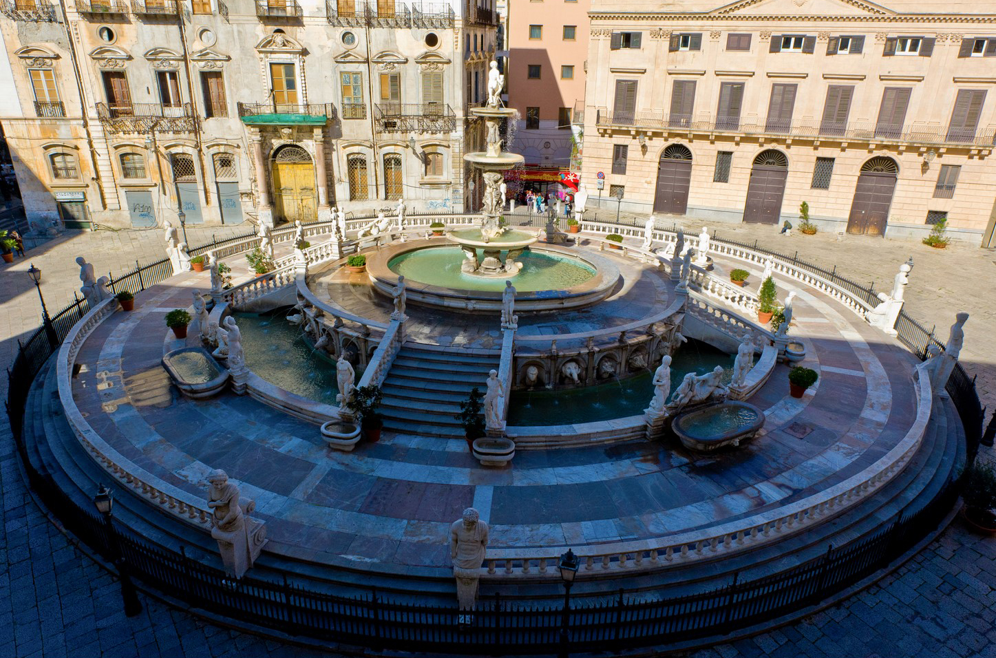 Fontana Pretoria This is a photo of a monument which is part of cultural heritage of Italy.